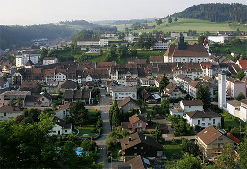 Willisau